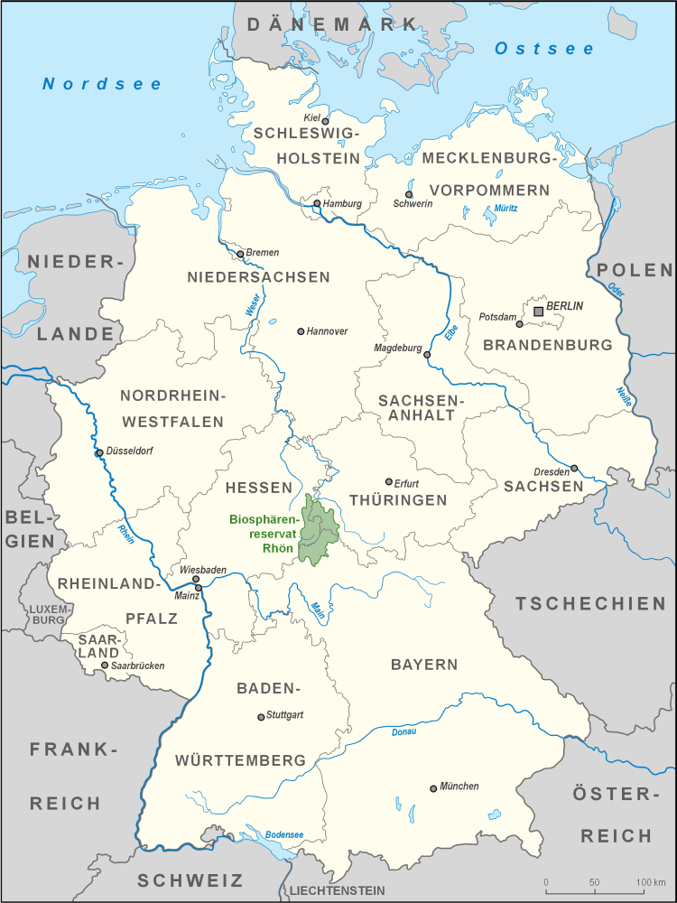 Karte des Biosphärenreservates Rhön in Deutschland